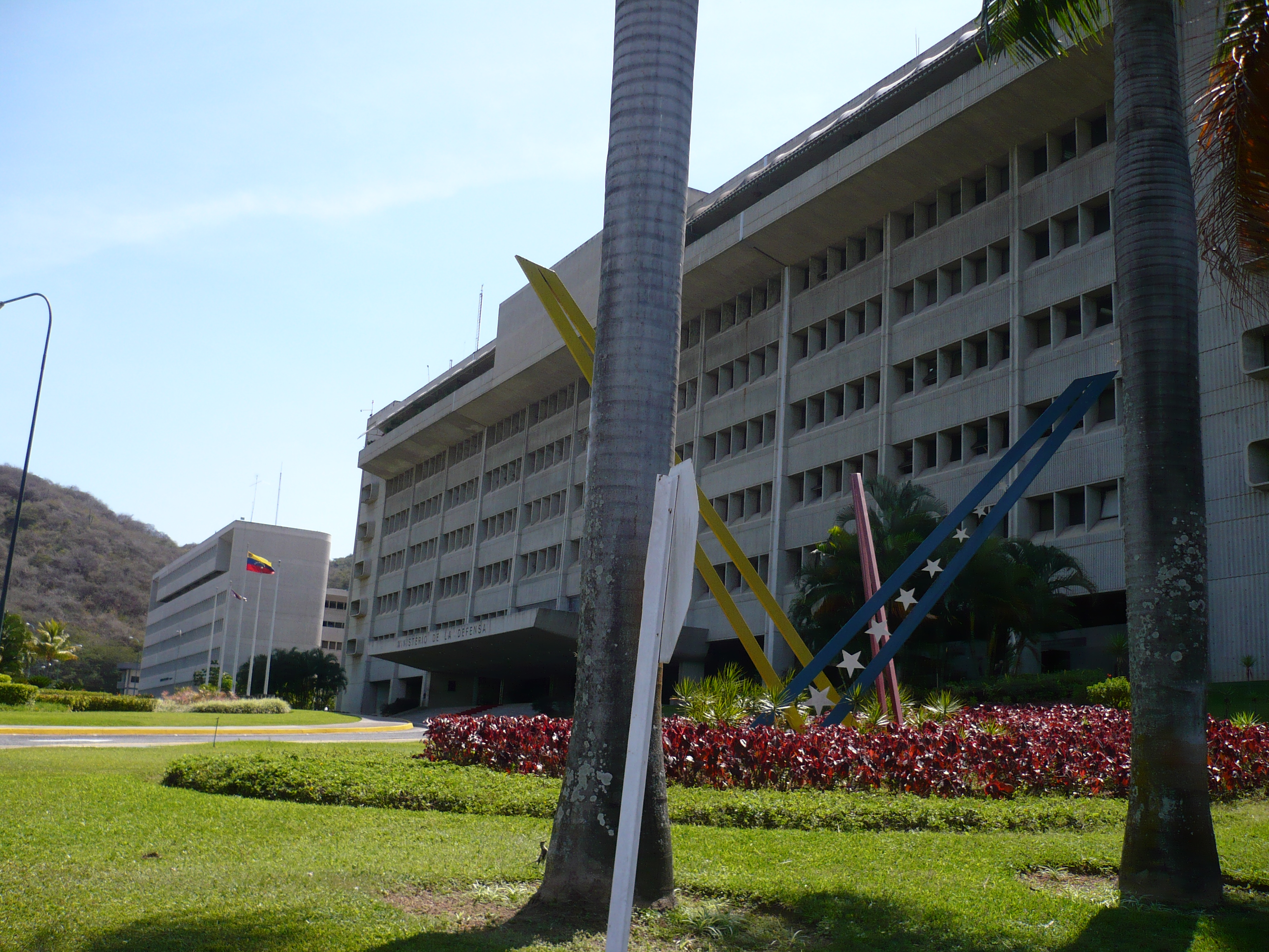 oficinas 1 y 2 del Ministerio de la defensa de venezuela en Fuerte Tiuna - Caracas